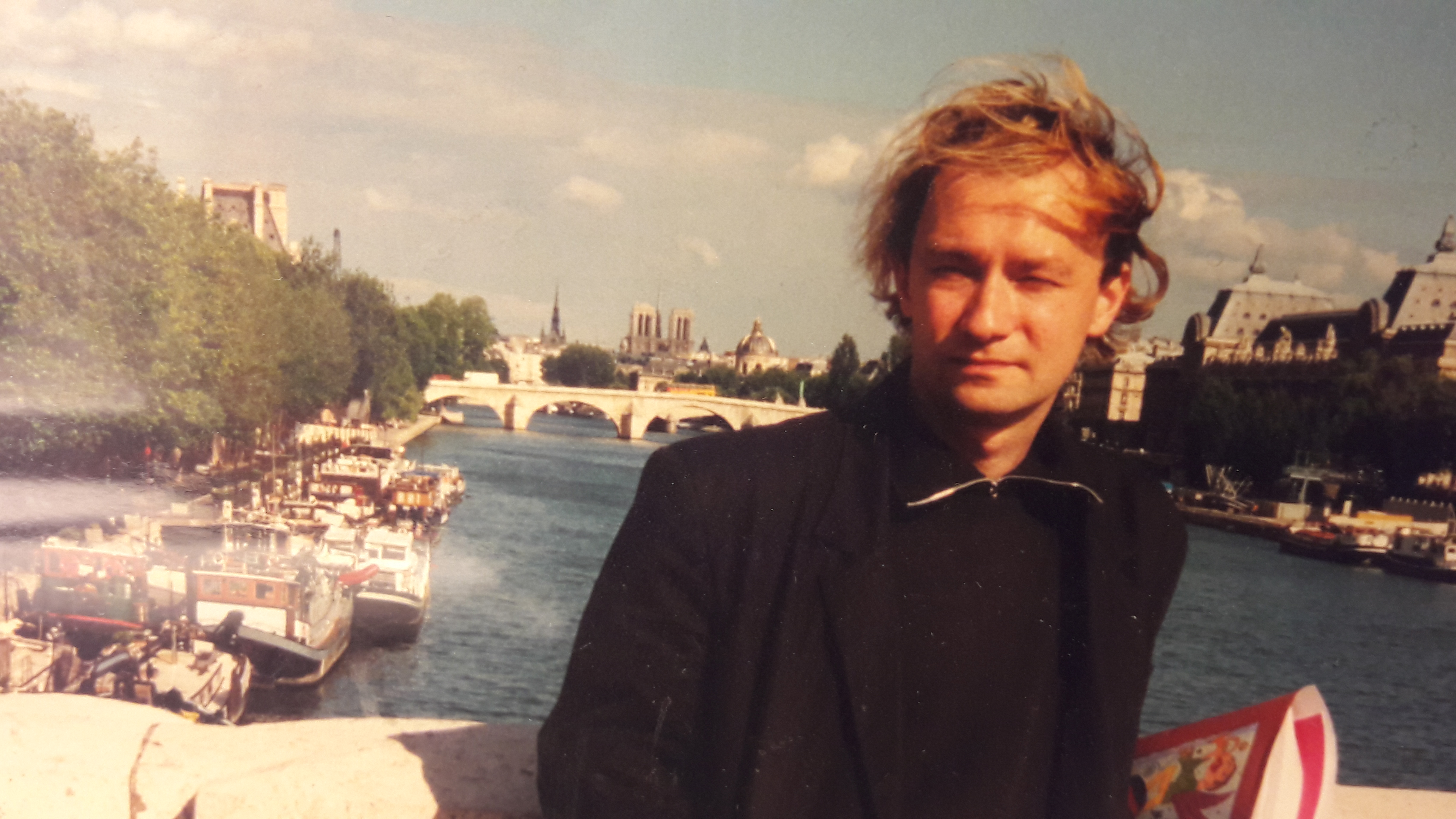 Párizs